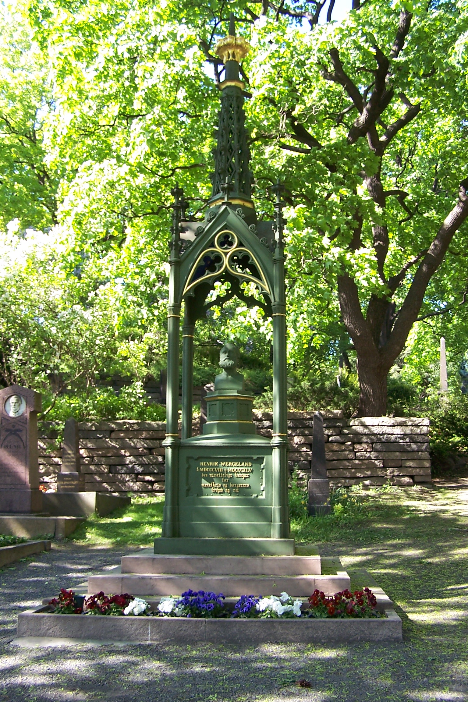 Tomb of Henrik Wergeland at Vår Frelsers gravlund, Oslo